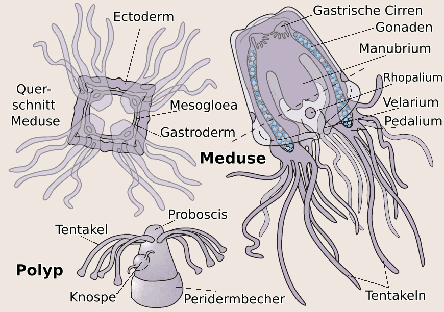 Lebenszyklus einer Würfelqualle (Cubozoa)